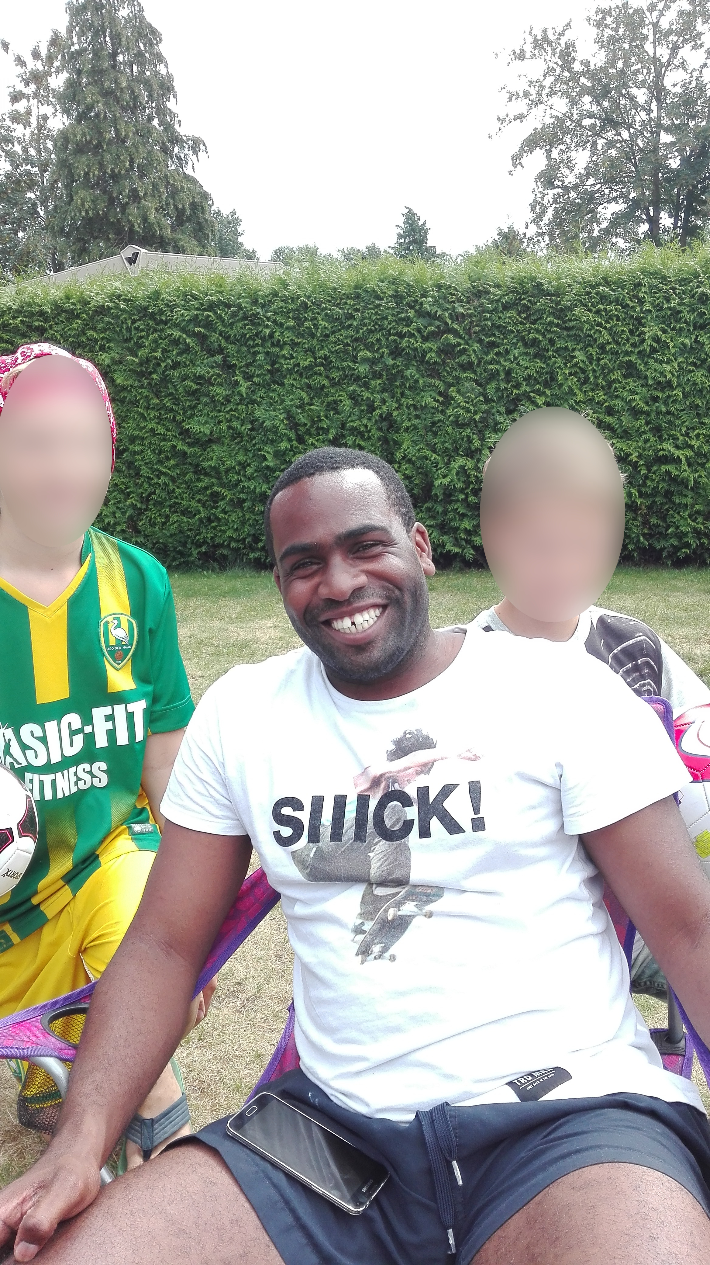 Revy Rosalia met twee fans